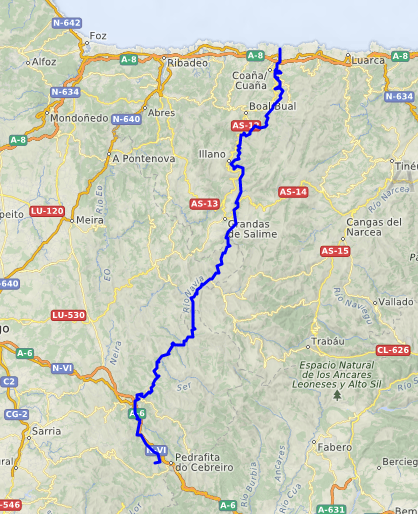 carte réalisée sur umap This map may be incomplete, and may contain errors. Don't rely solely on it for navigation.